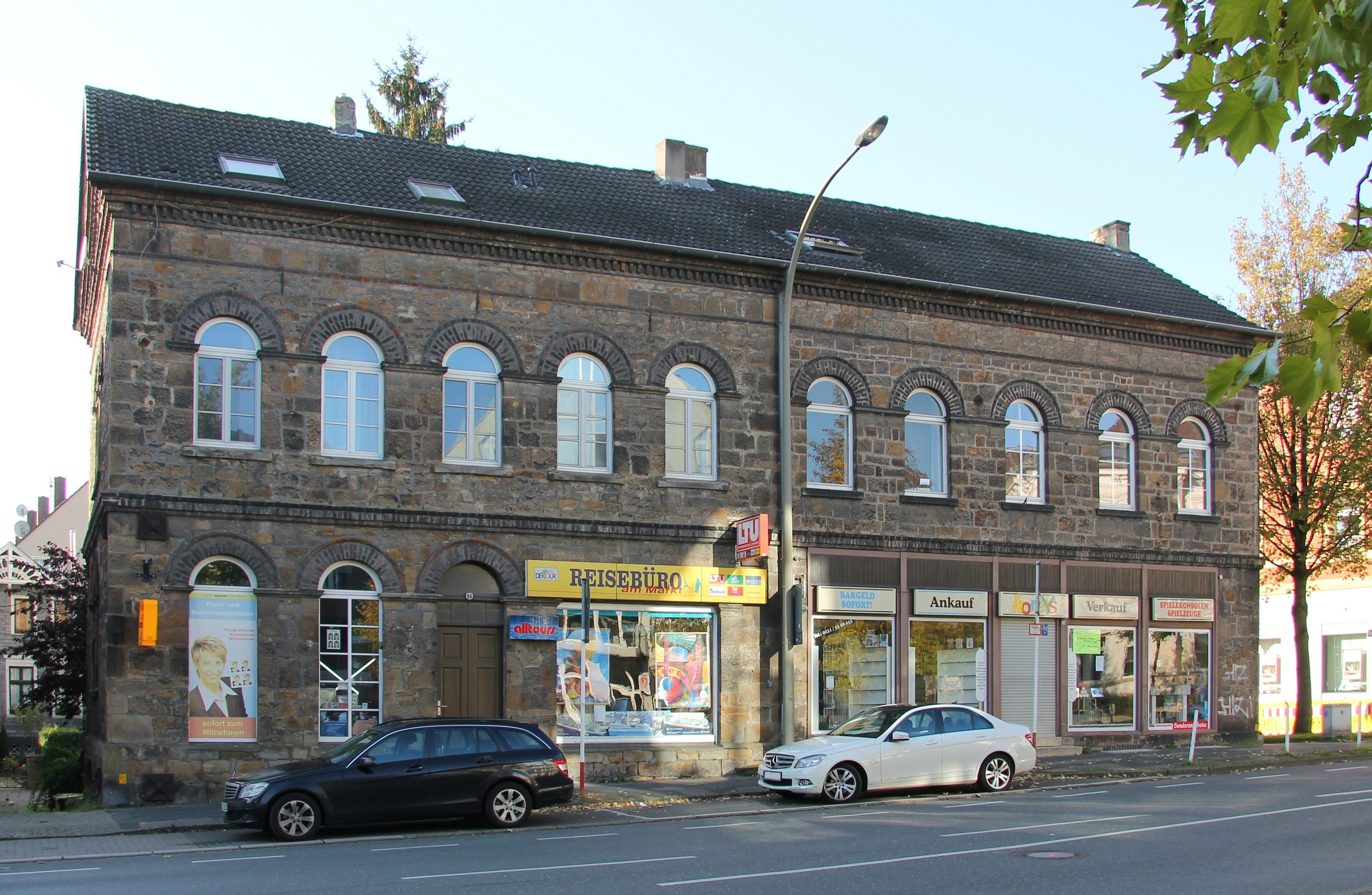 Das alte Amtshaus in Dortmund Aplerbeck